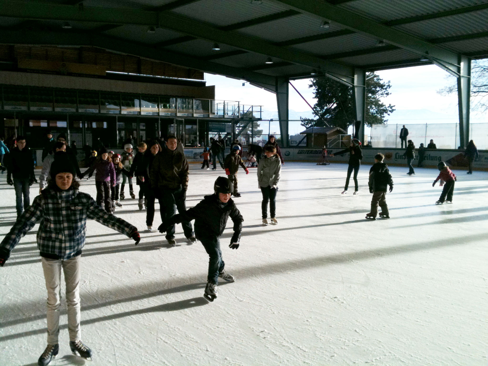 Strandbad Eichwald – Eissportanlage (Lindau im Bodensee)